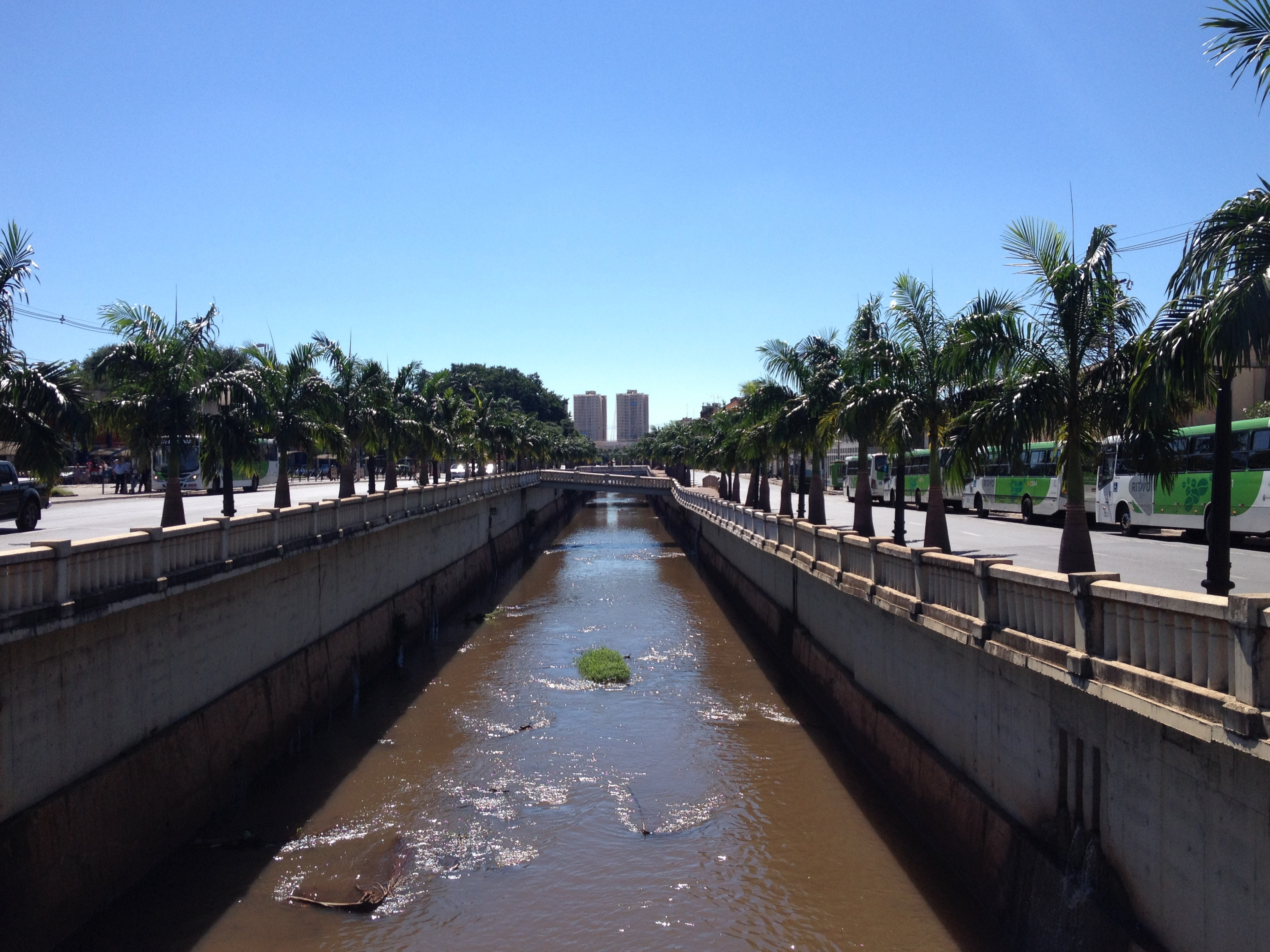 Ribeirão Preto recebeu o nome em função do curso d'água homônimo.